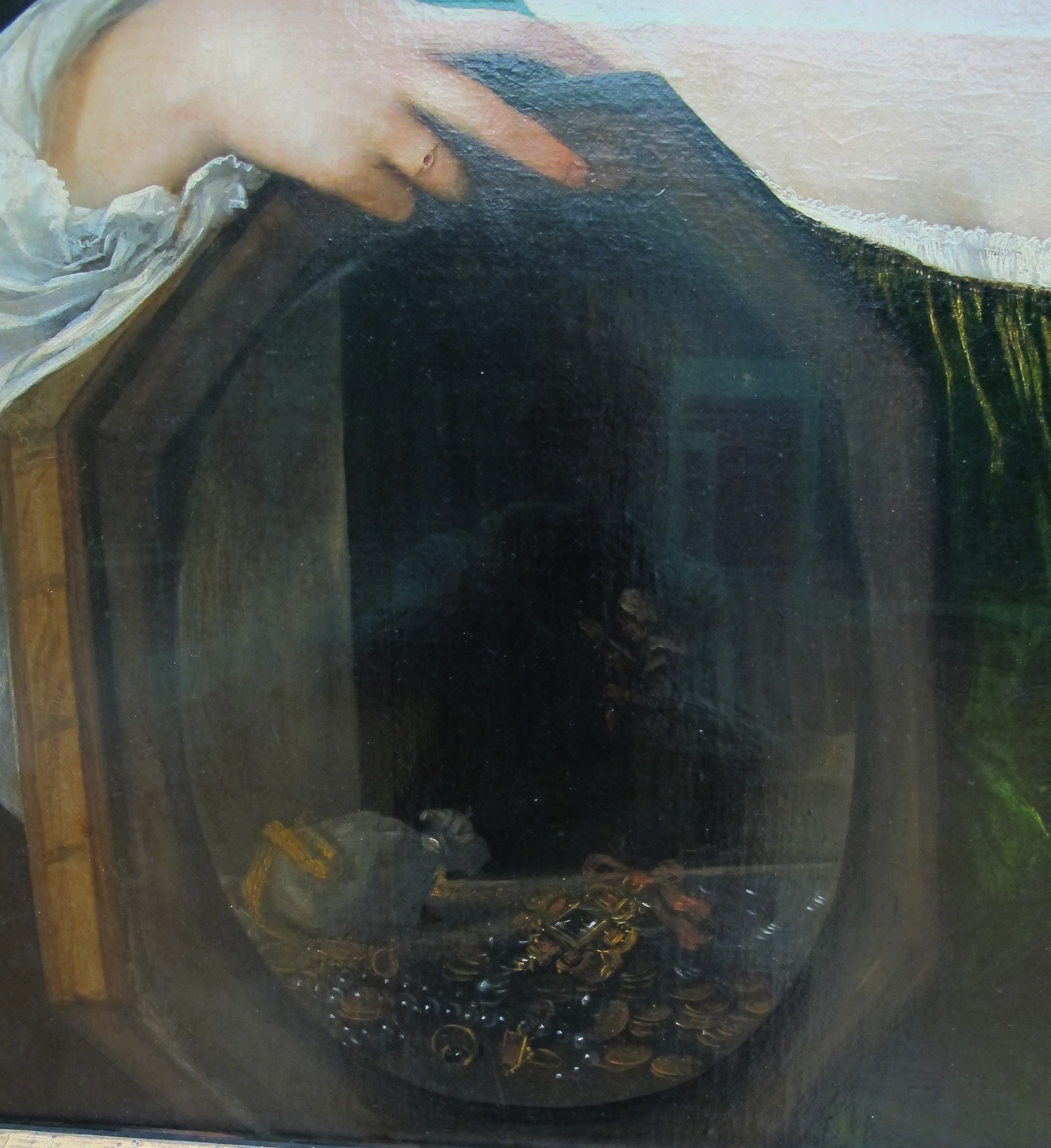 detail